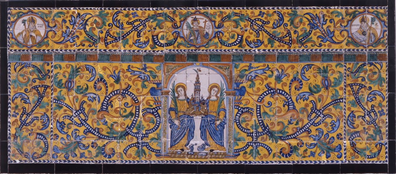 Santas Justa y Rufina, ceramics, 1053 x 117 cm. Museo de Bellas Artes de Sevilla, procedente del antiguo convento de la Asunción de Sevilla